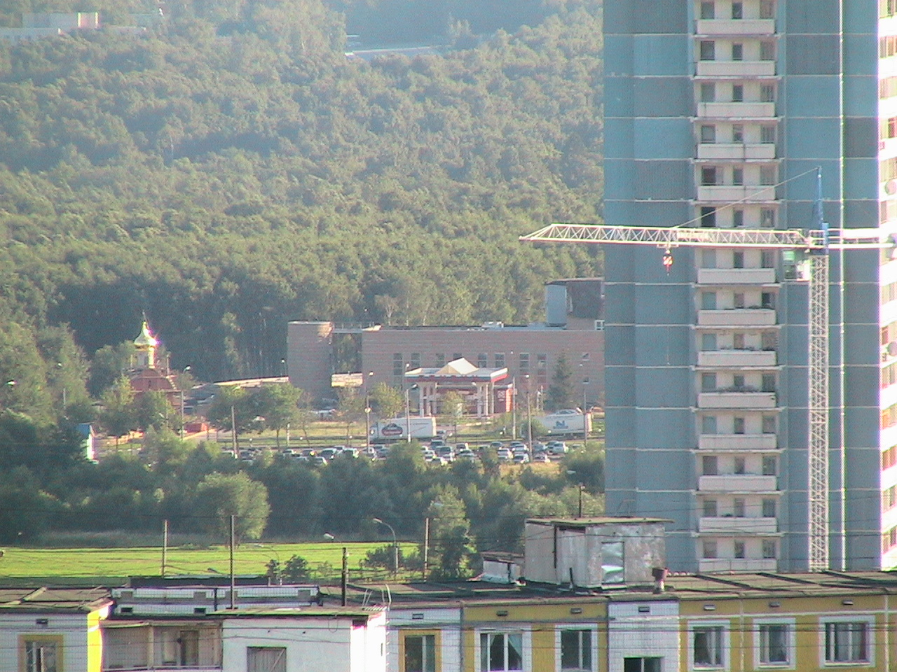 Вид на Трансвааль парк в Ясенево летом 2006 года